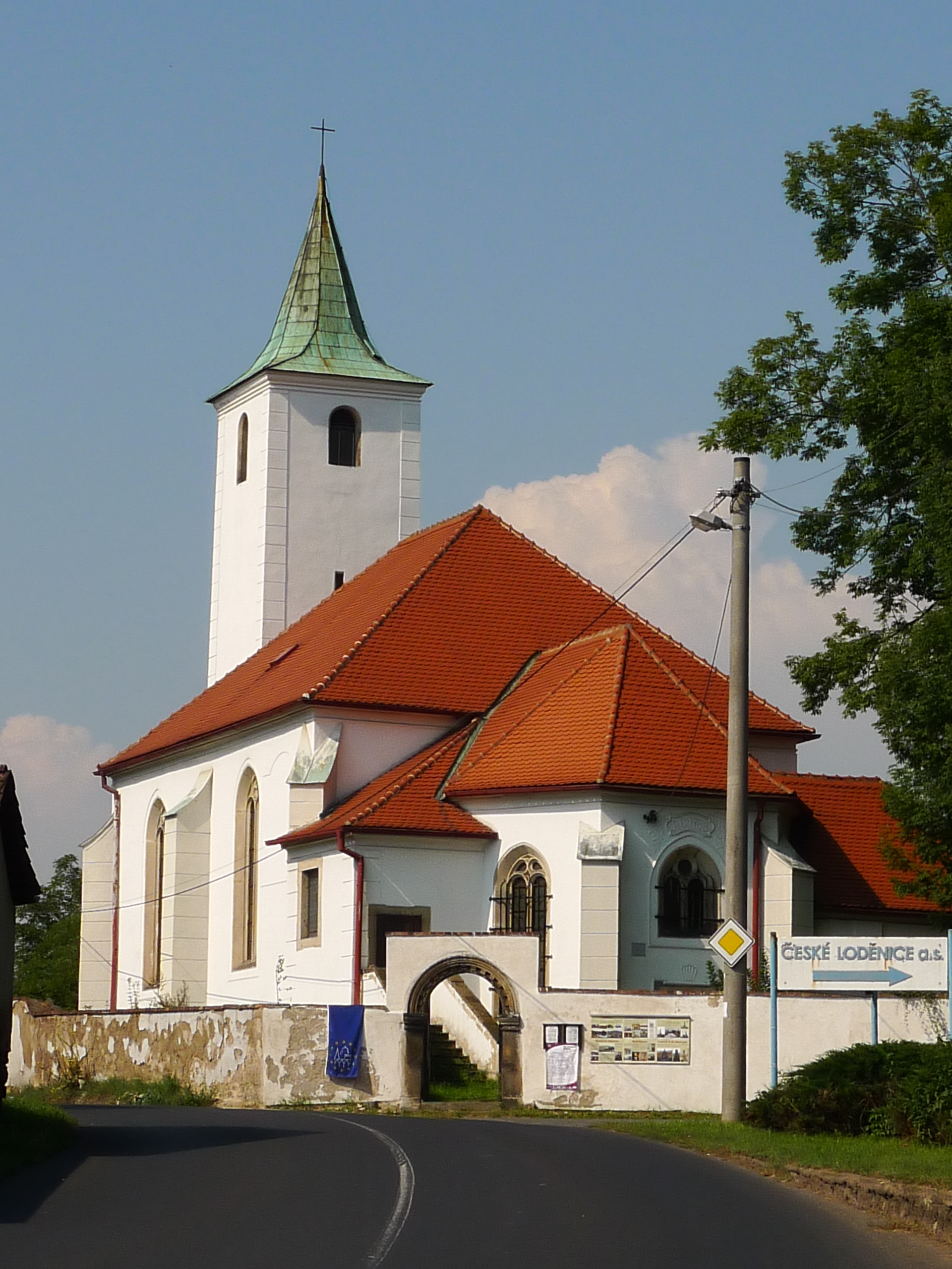 Kostel svatého Václava, Valtířov.